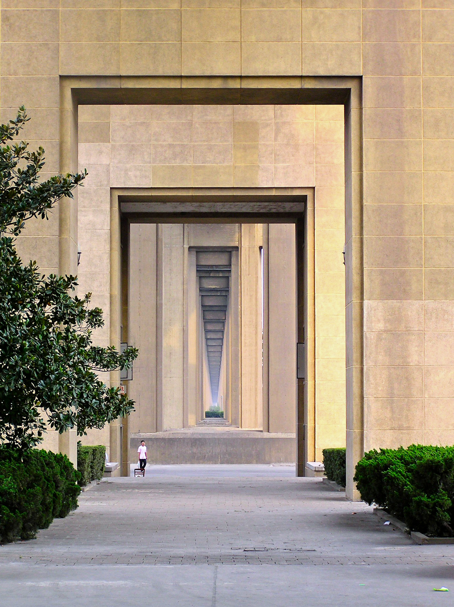 Pont de Nankin sur le Yangtzé (Chine) - Vue de l'alignement des gigantesques piles du pont